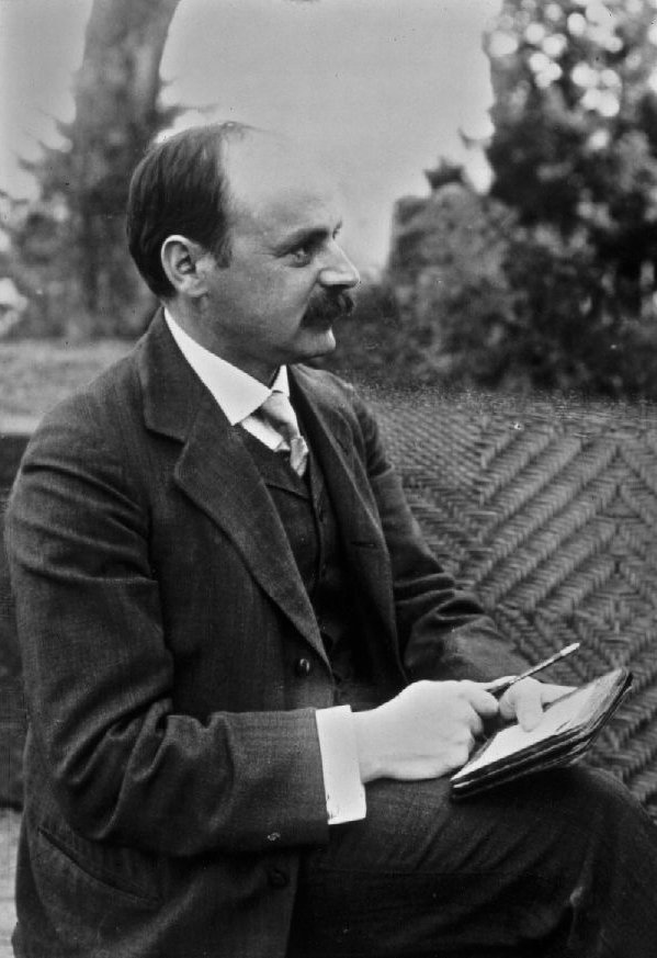 Karl Schwarzschild, german physicist